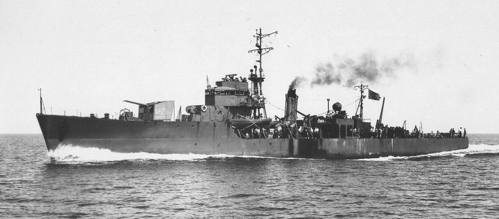 日本海軍第二号型海防艦『第二十二号海防艦』、長崎沖